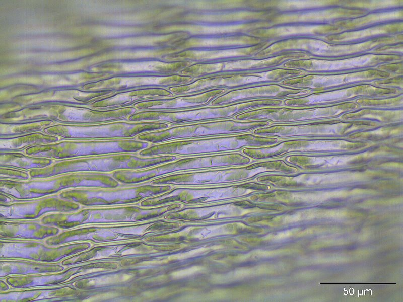 Stern-Goldschlafmoos (Campylium stellatum), Laminazellen, Vergrößerung: 400x